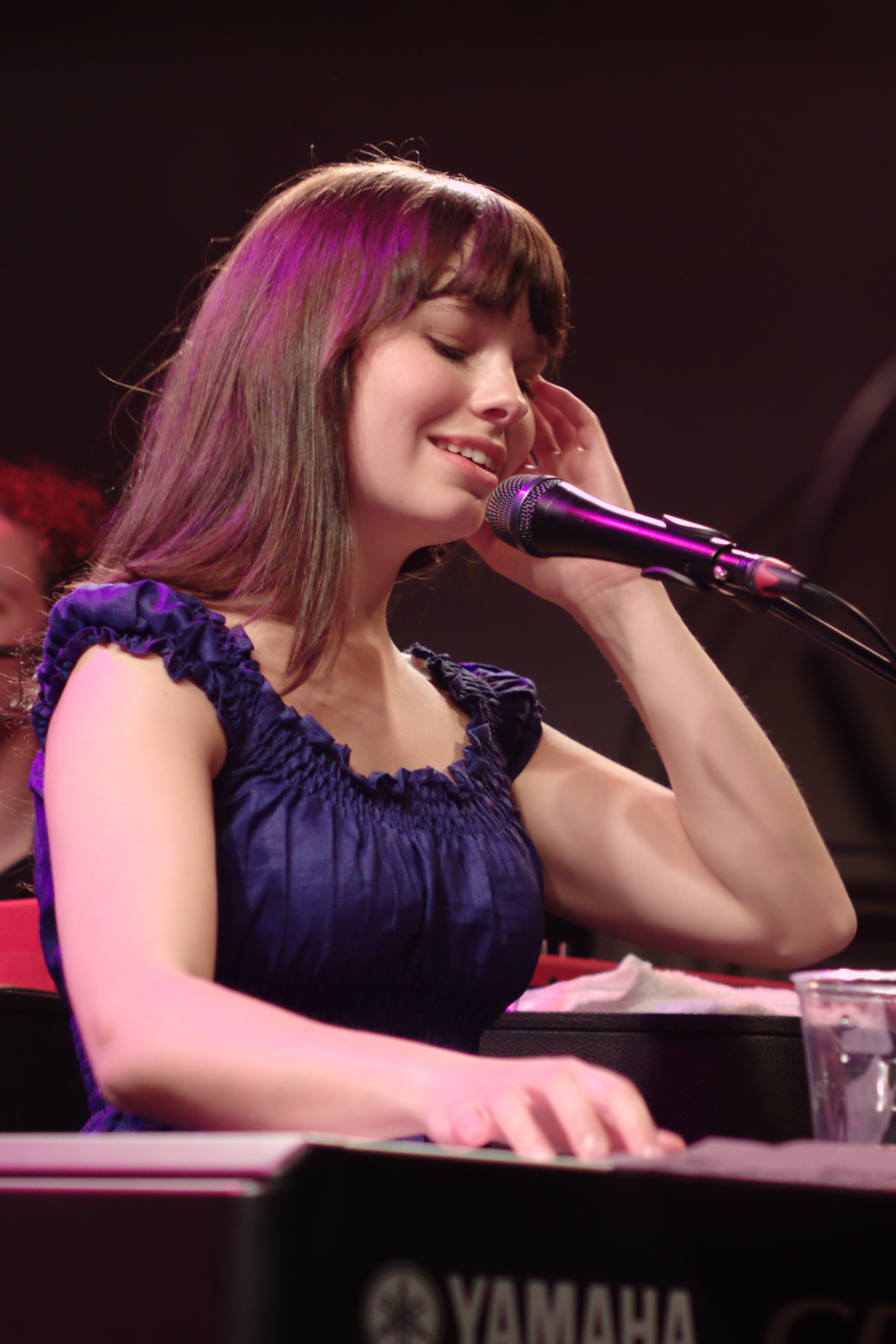 Marit Larsen in Paradiso, Amsterdam, 2009-04-22